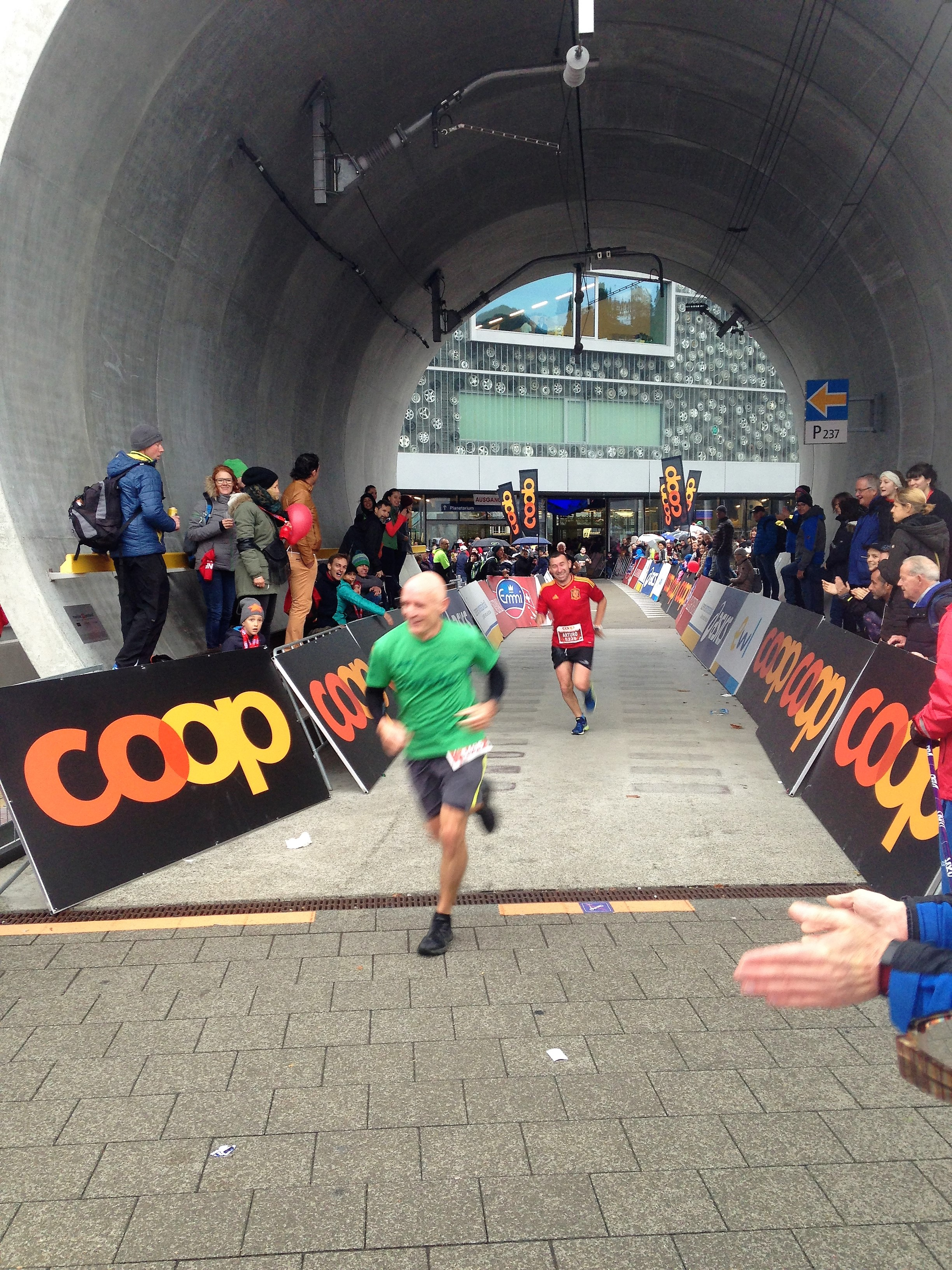 Marathonläufer im Verkehrshaus der Schweiz beim Zieleinlauf des Swiss City Marathon 2017.